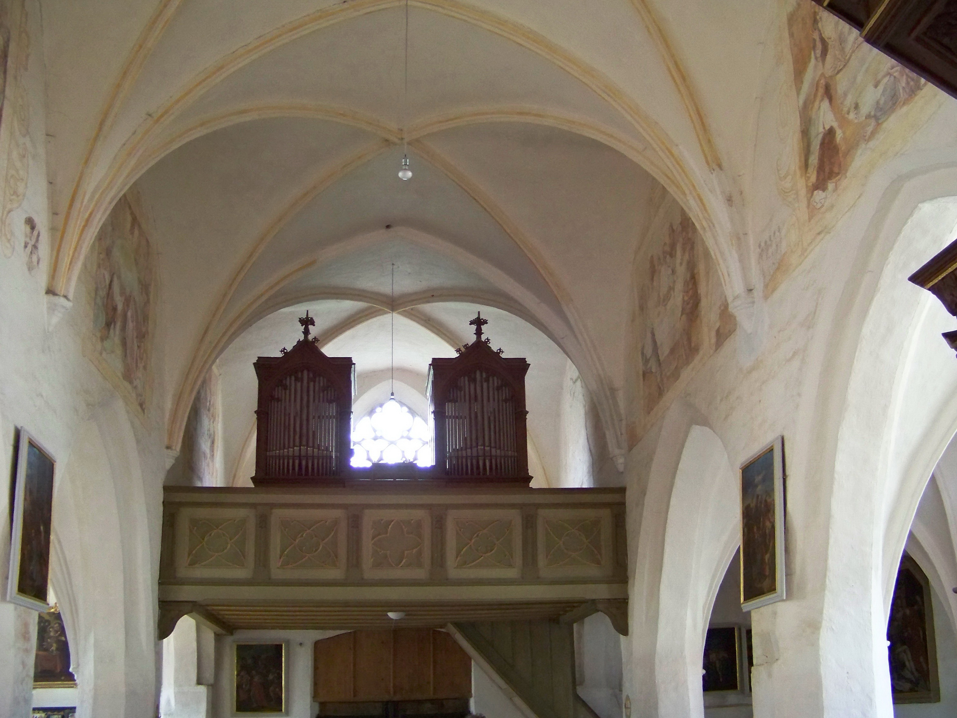 Adlkofen, Jenkofen 13. Katholische Kirche Mariä Himmelfahrt. Westempore mit gerader Brüstung mit fünf Feldern und zweiteiligem Orgelprospekt.